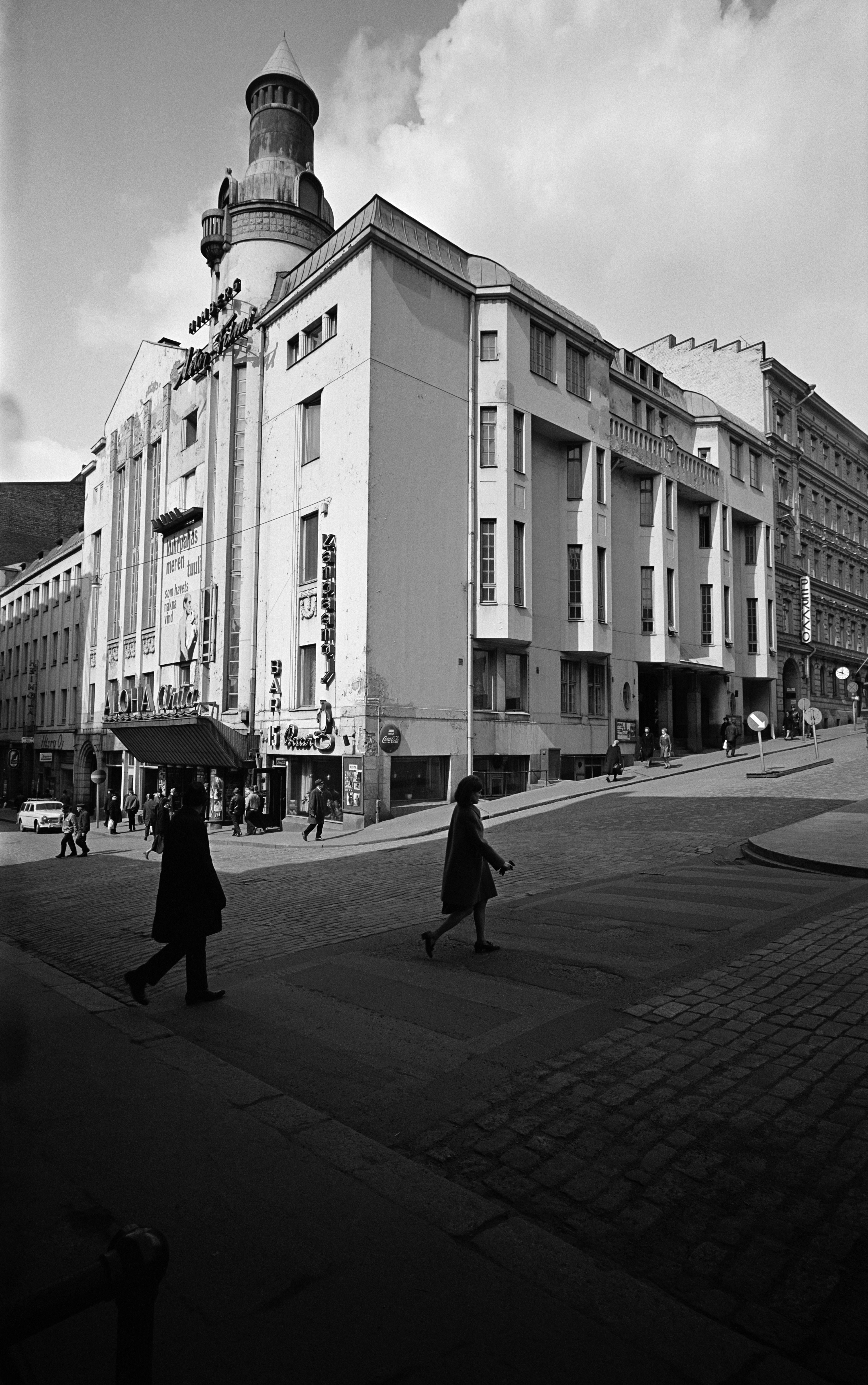 Hallituskatu 15 (Yliopistonkatu 5), Heimolan talo. Purettu 1969.